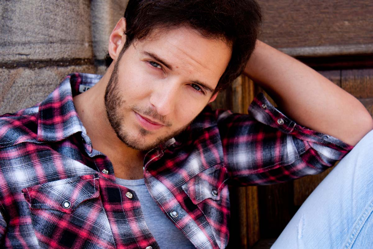 Marc Philipp, Schauspieler